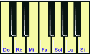 Description : dessin d'une octave d'un clavier. Licence : GFDL Auteur : iubito iubito